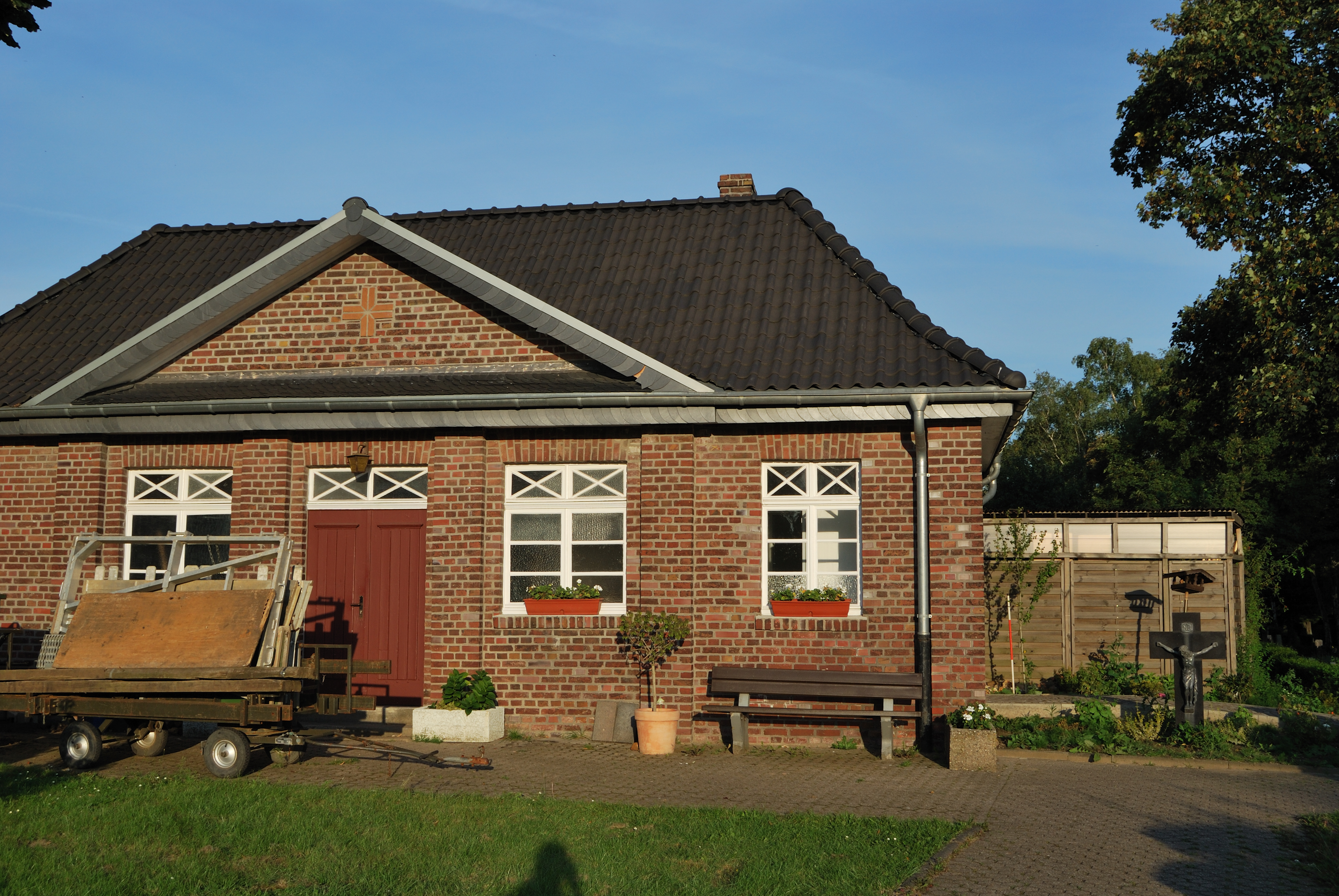 Friedhofstraße, Denkmalnummer 234